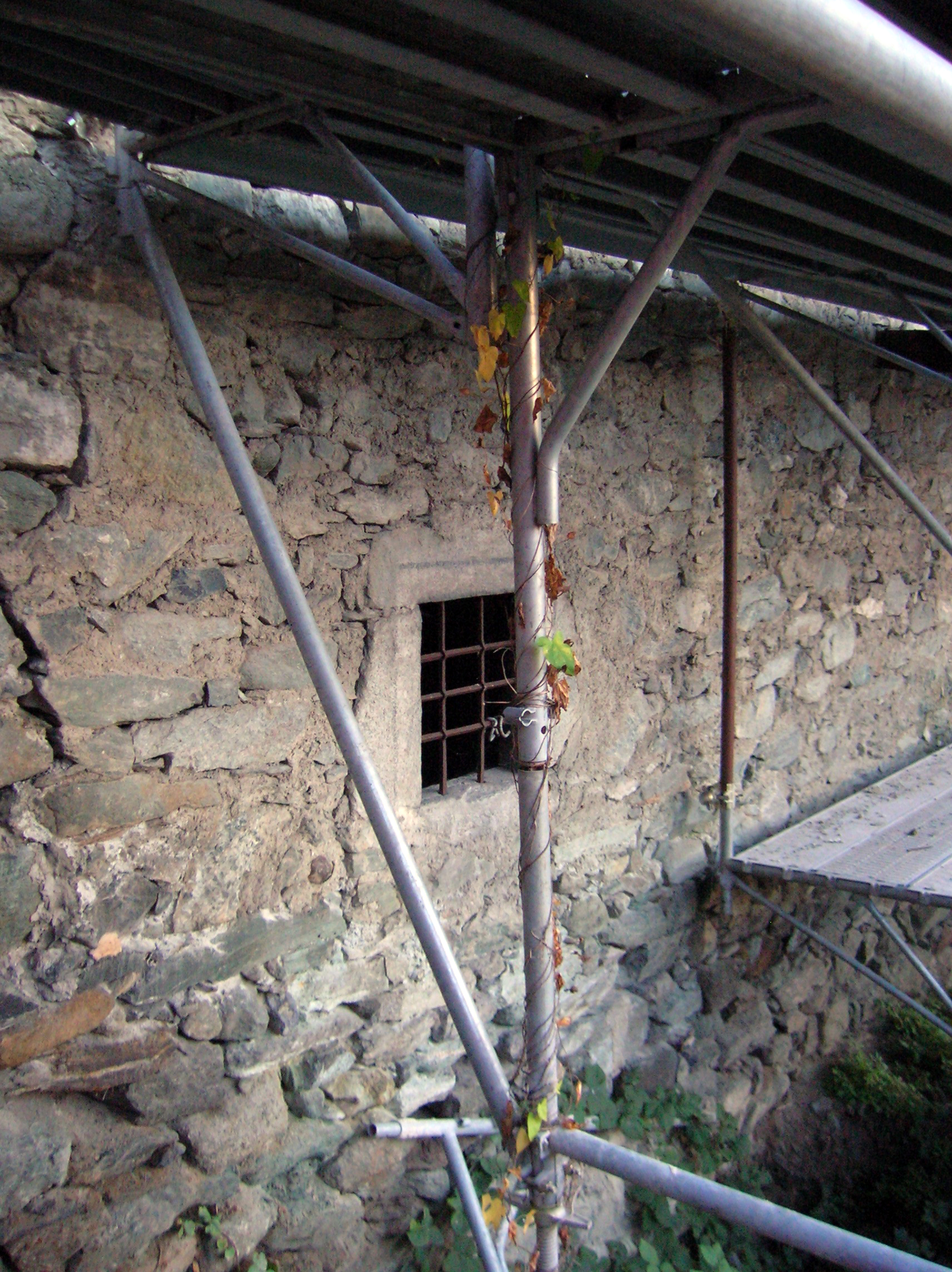 Torre di Néran durante il restauro, Châtillon, Valle d'Aosta, Italia.